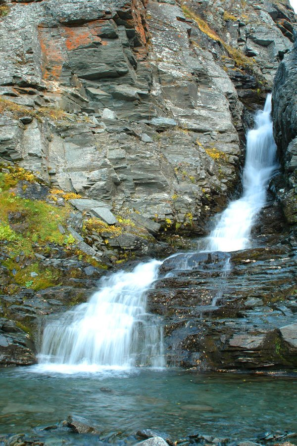 Foss i Tronget, Vinstradalen